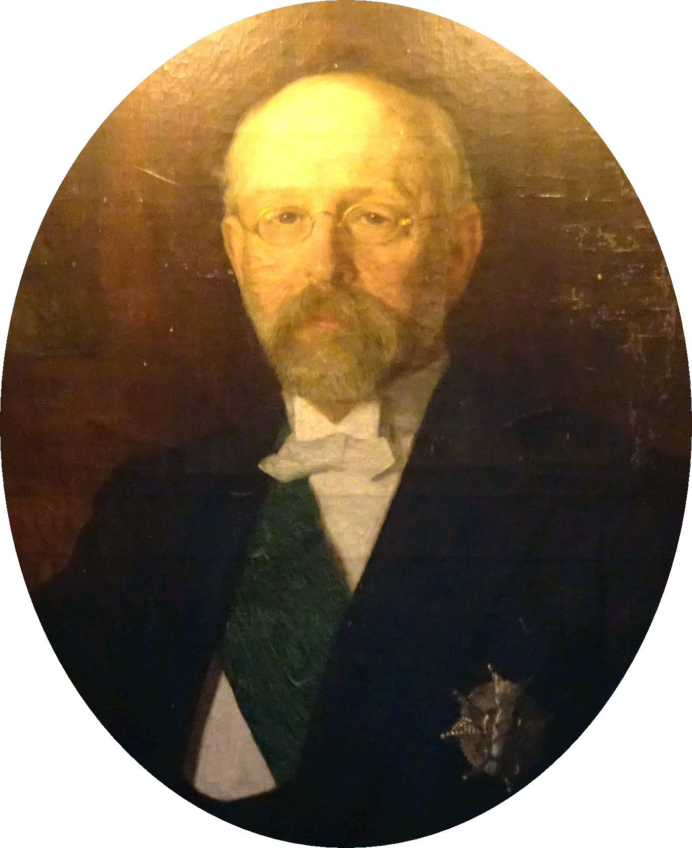 Porträtt av John Bernström på Villa Skärtofta